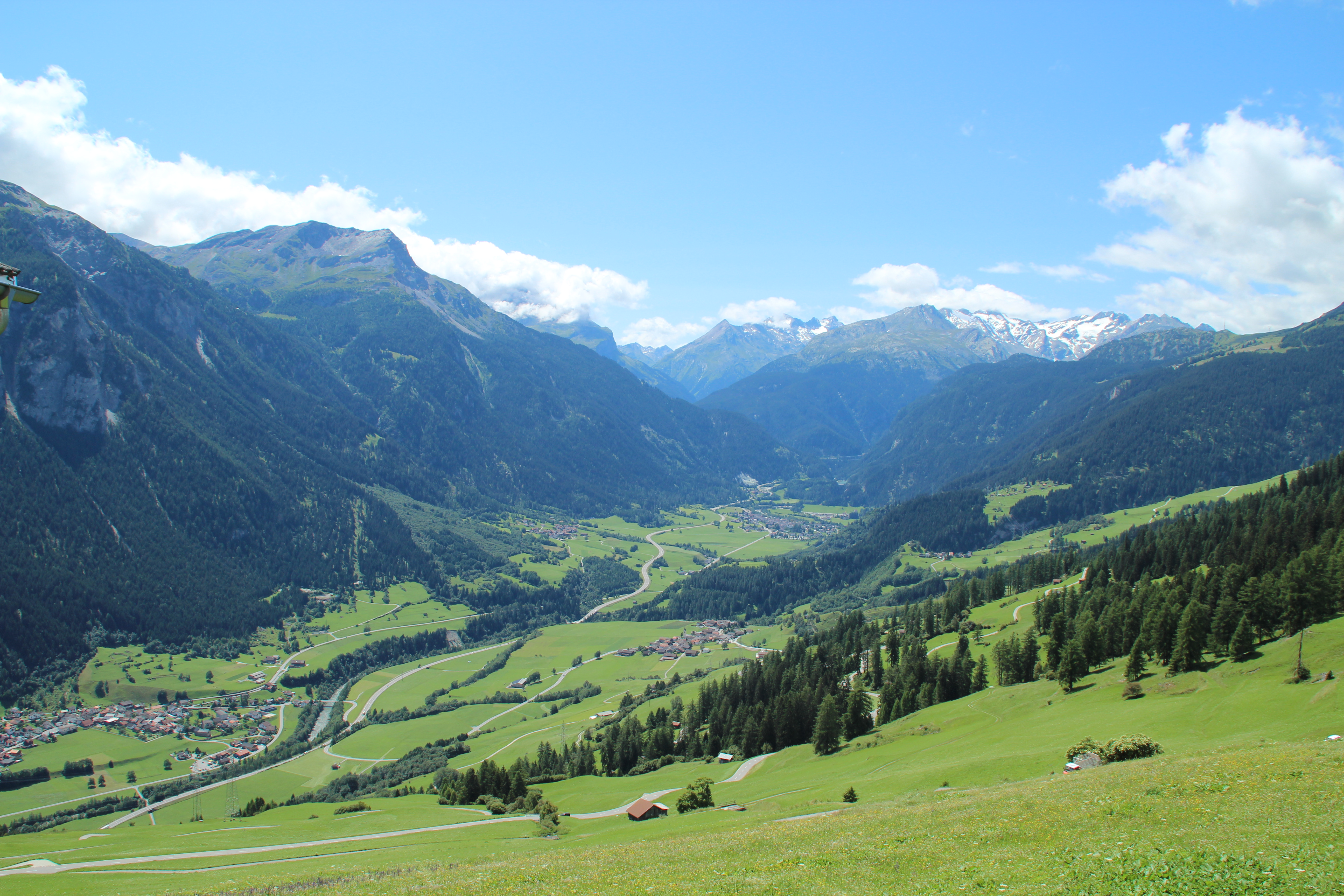 Schams, Blick nach Süden. Links unten Zillils.